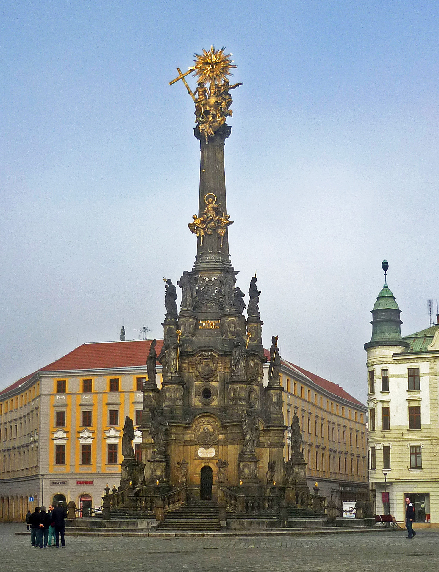 Dreifaltigkeitssäule in Olmütz (Olomouc) in Mähren